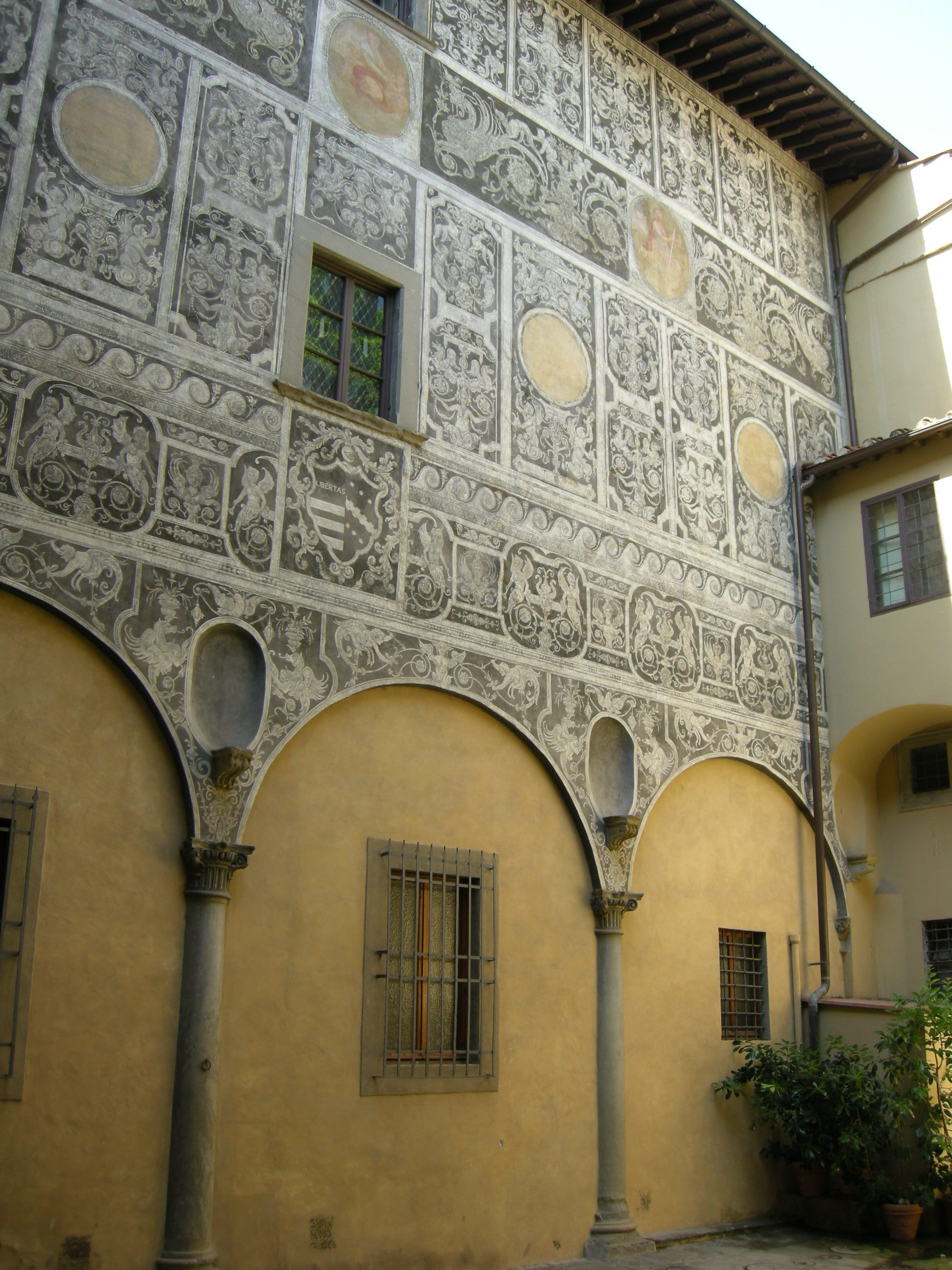 Palazzo de' pepi, cortile, graffiti